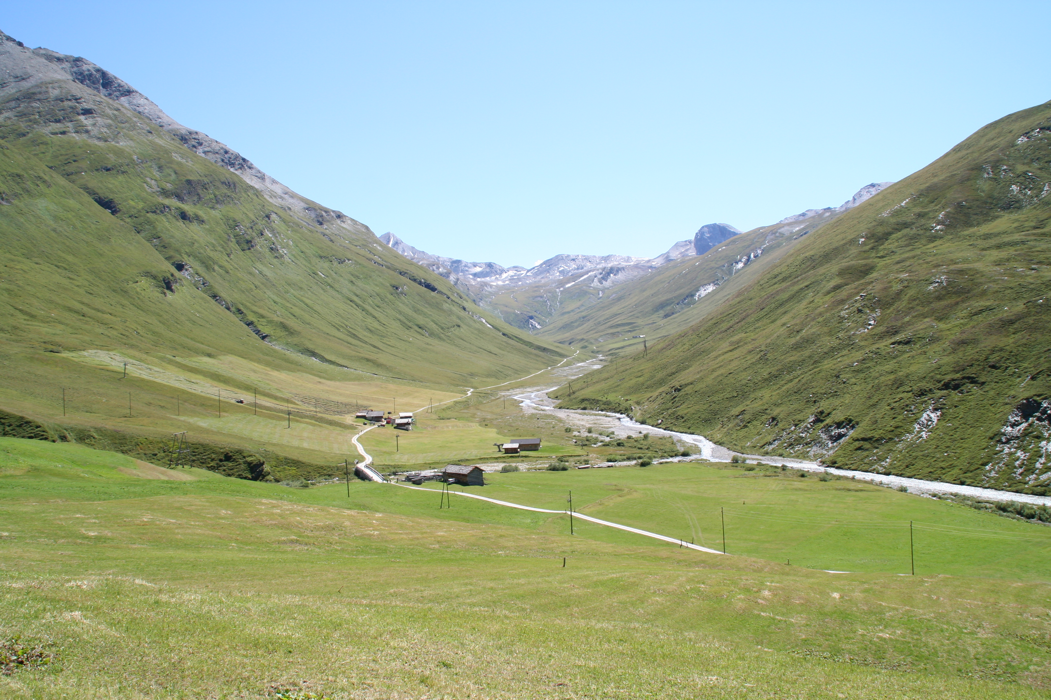 Glaziales Trogtal bei Juf